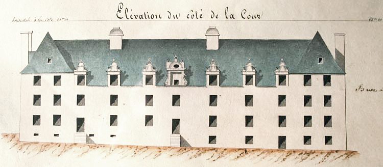 La caserne Plougastel Plans du château de Brest - dressés par les officiers du Génie – plan approuvé Le 15 novembre 1859 par le colonel Livet